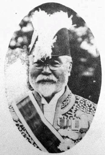 a Japanese man 高橋是清 (Korekiyo Takahashi)